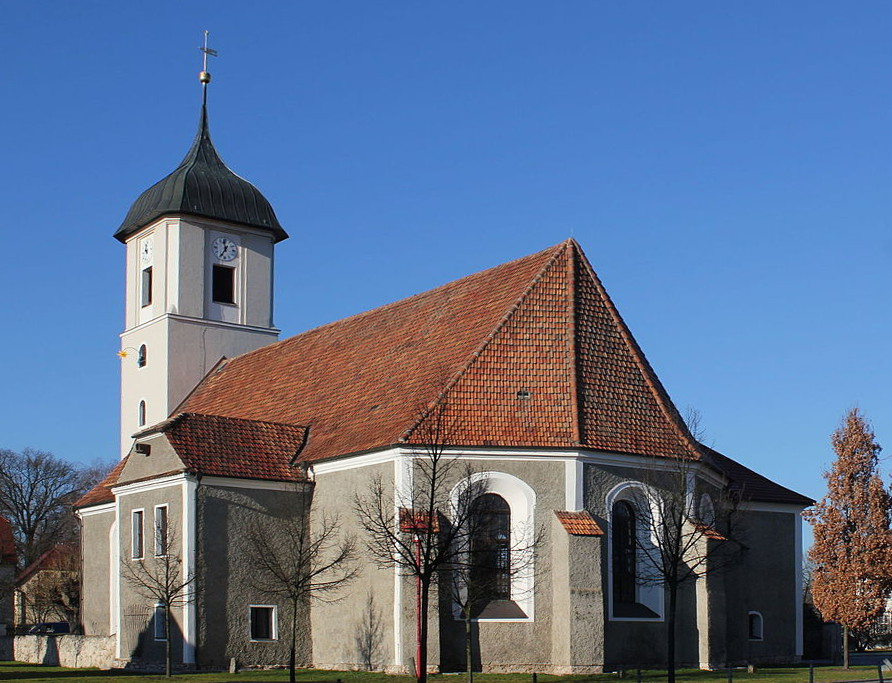 Hornjoserbsce: Ewangelska cyrkej w Malešecach.